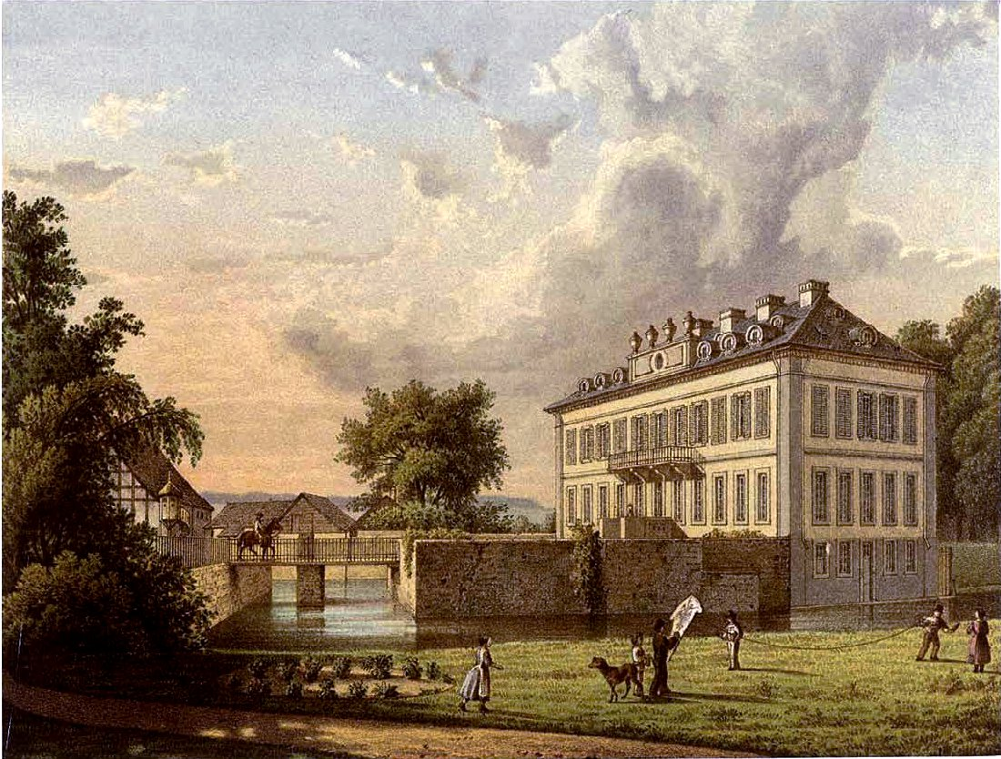 Rittergut Holzhausen, Lithografie aus dem 19. Jahrhundert